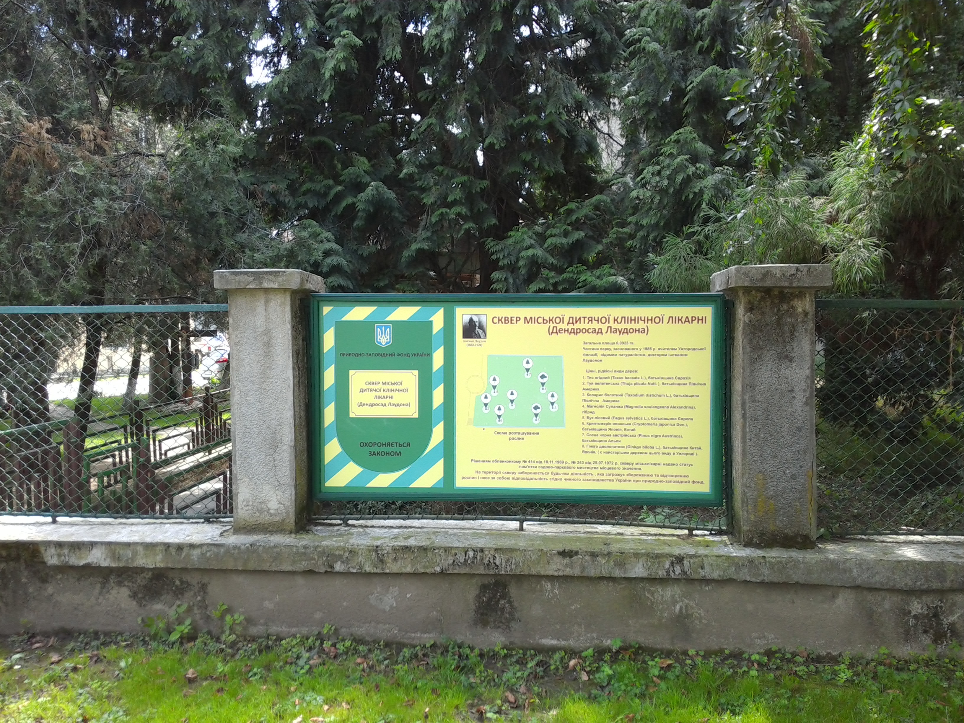 Сквер міськлікарні (дендросад Лаудона), м. Ужгород